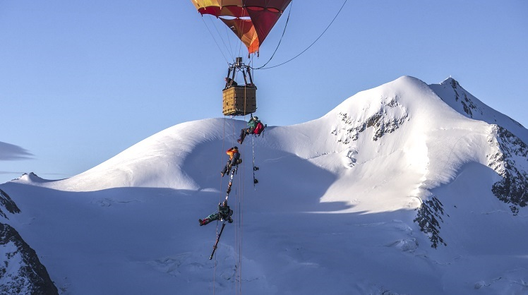 Balloonskiing - 5min vor dem Ausstieg